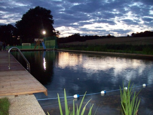 koupací biotop - letní večer